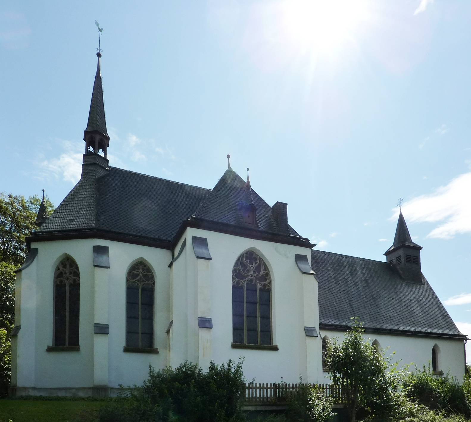 Sankt Johann Baptist (Bergisch Gladbach)